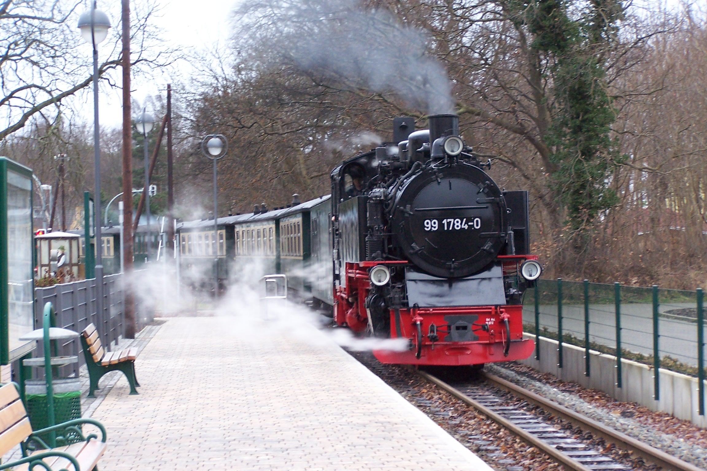 Dampflok 99 1784 in Baabe bei der Einfahrt